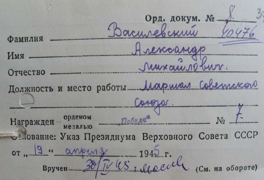 Учётная карточка на орден «Победа» А.М.Василевского